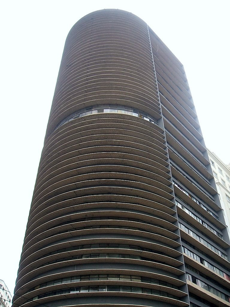 Edifício Montreal, projeto de Oscar Niemeyer (1950); Avenida Ipiranga, centro da cidade de São Paulo, Brasil.